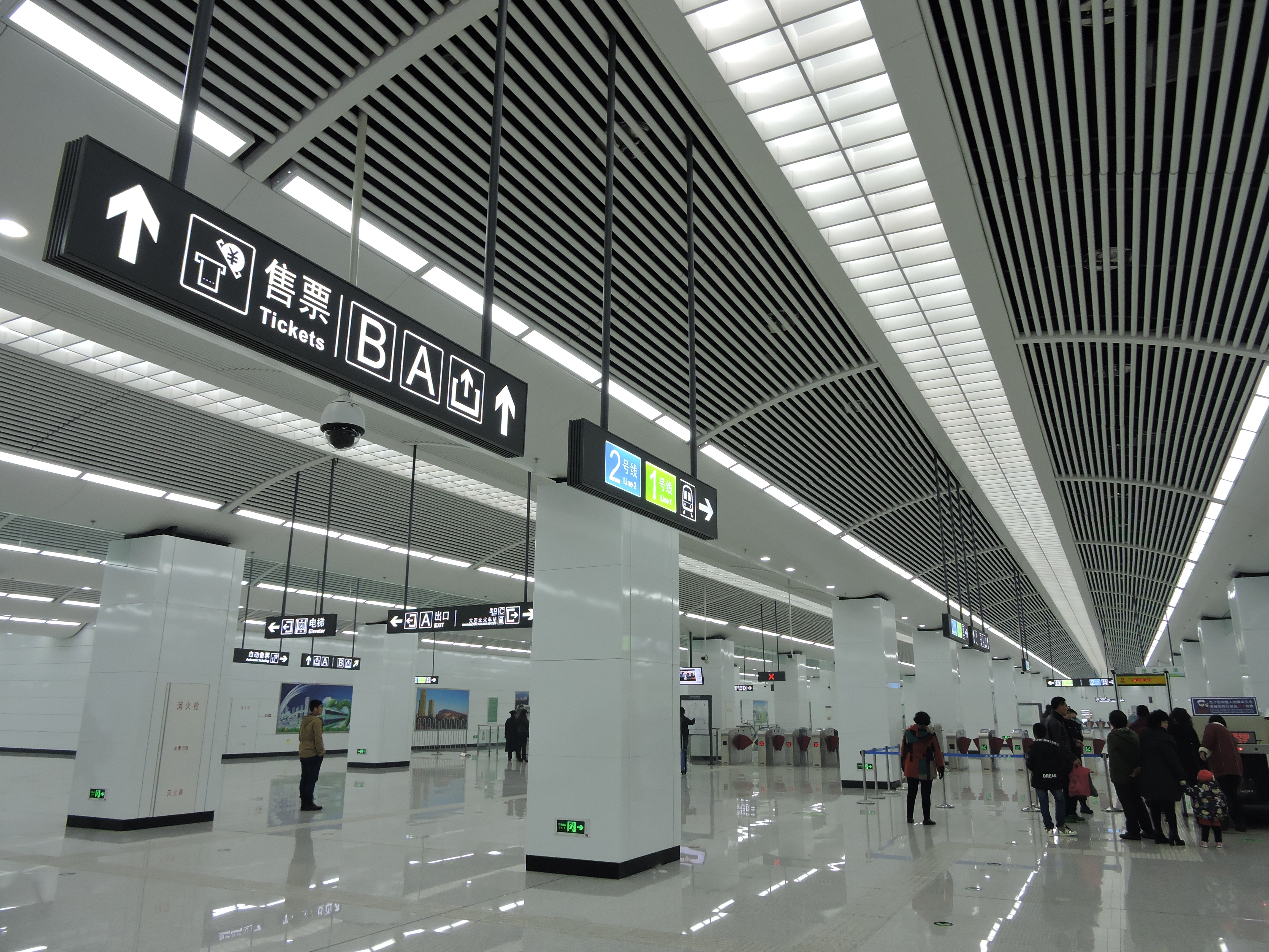 大连北站 (地铁)